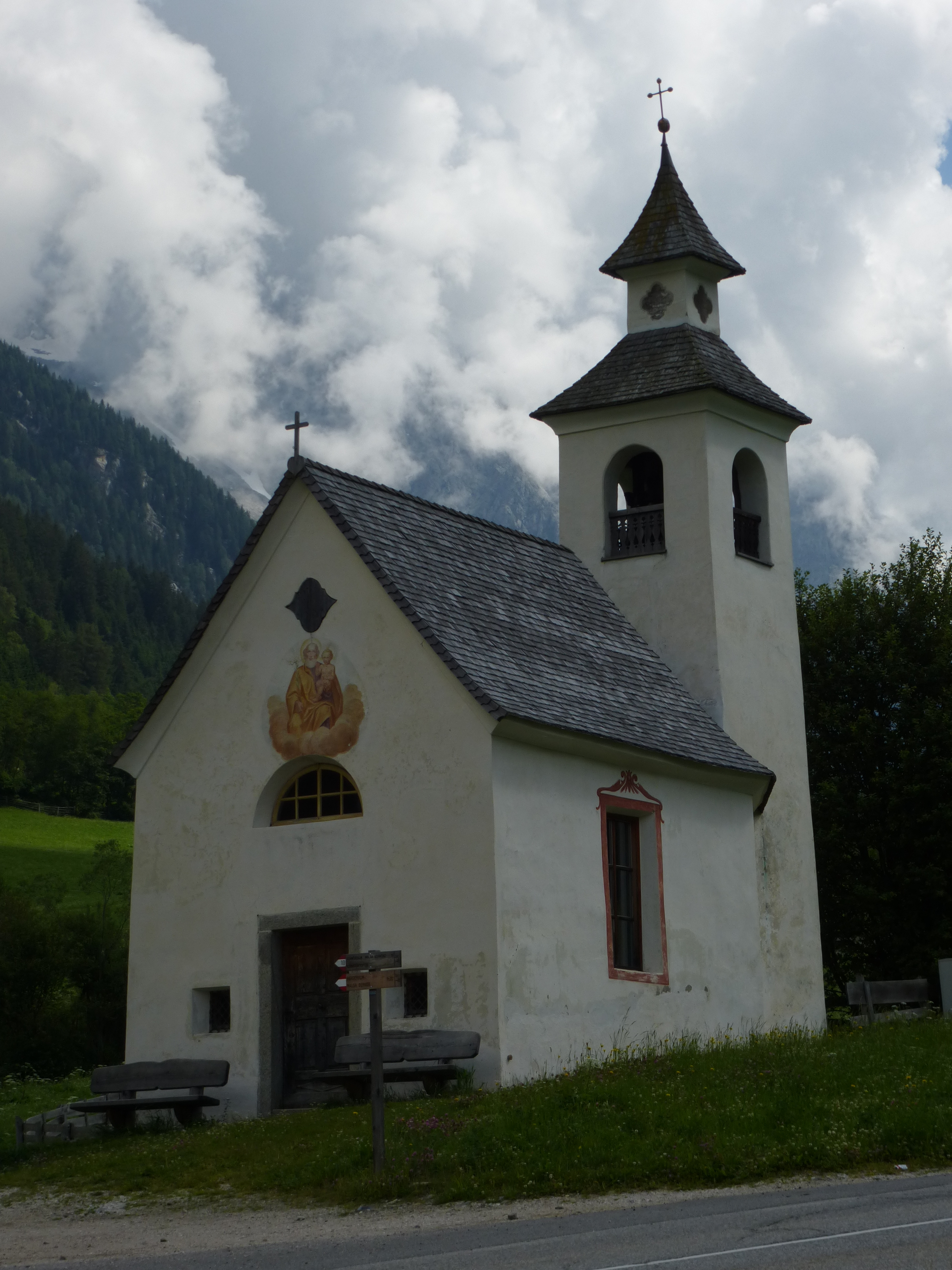 St.-Josefs-Kapelle in Obertal (Antholz, Südtirol)